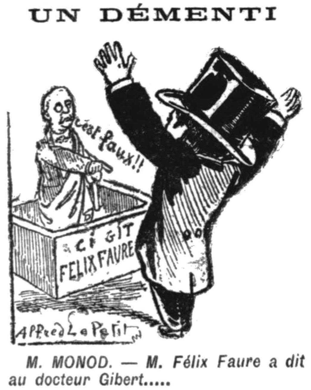 "Un Démenti".